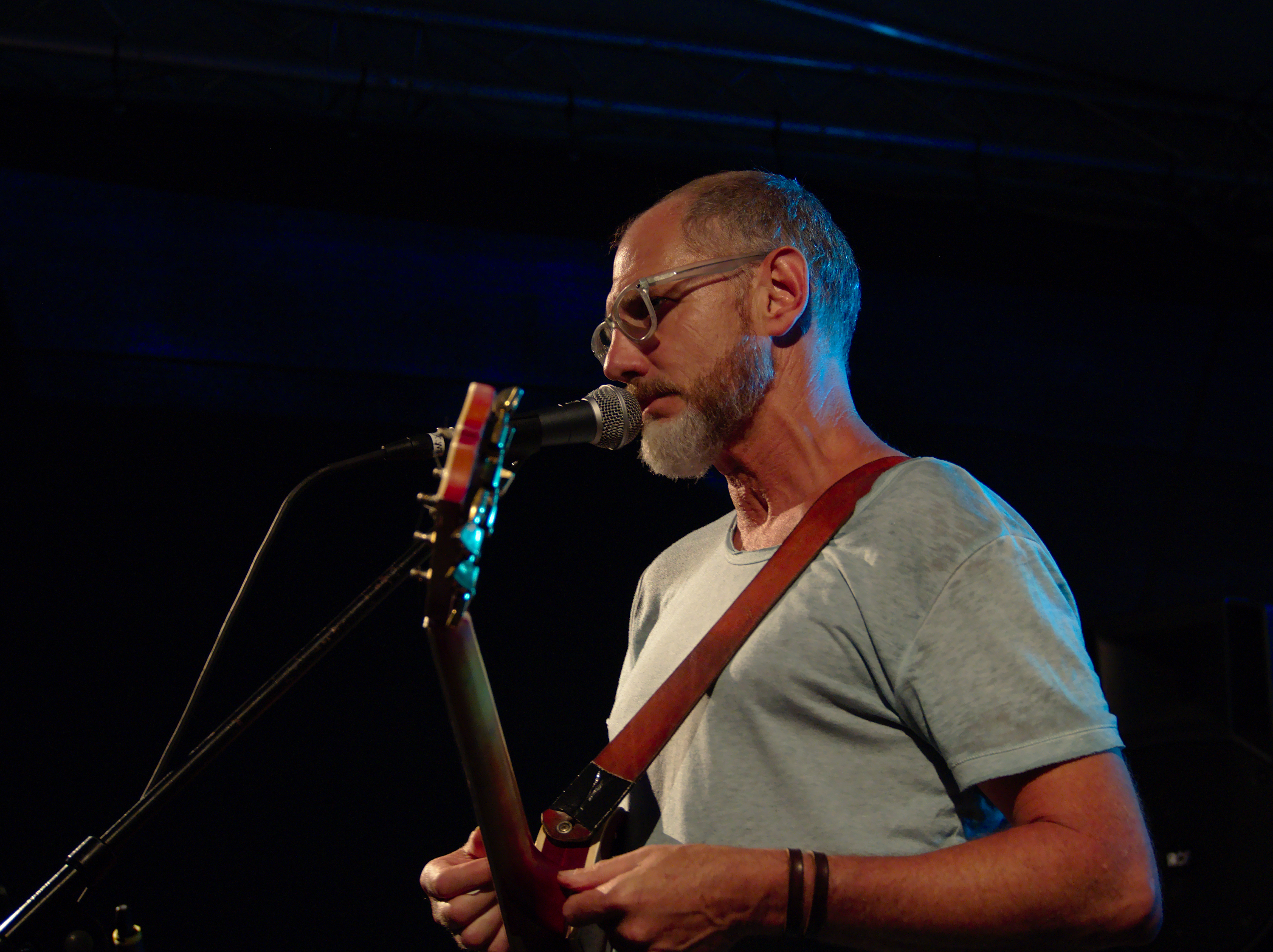 Stephan Maria Glöckner beim Konzert der Band menino auf dem Sinziger Weinsommer 2017